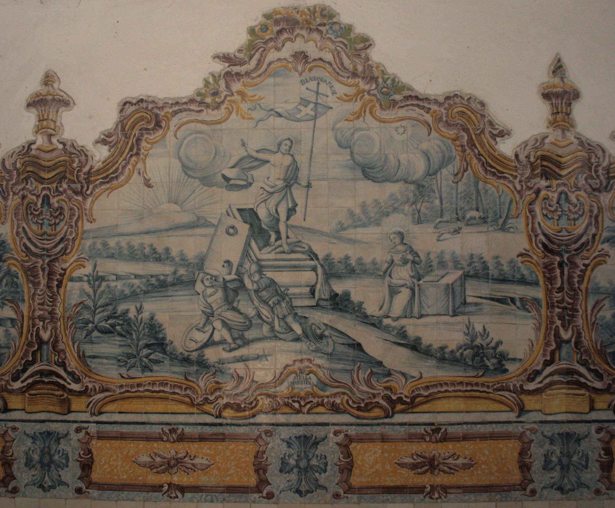 Painel de azulejos do Convento de Jesus em Setúbal